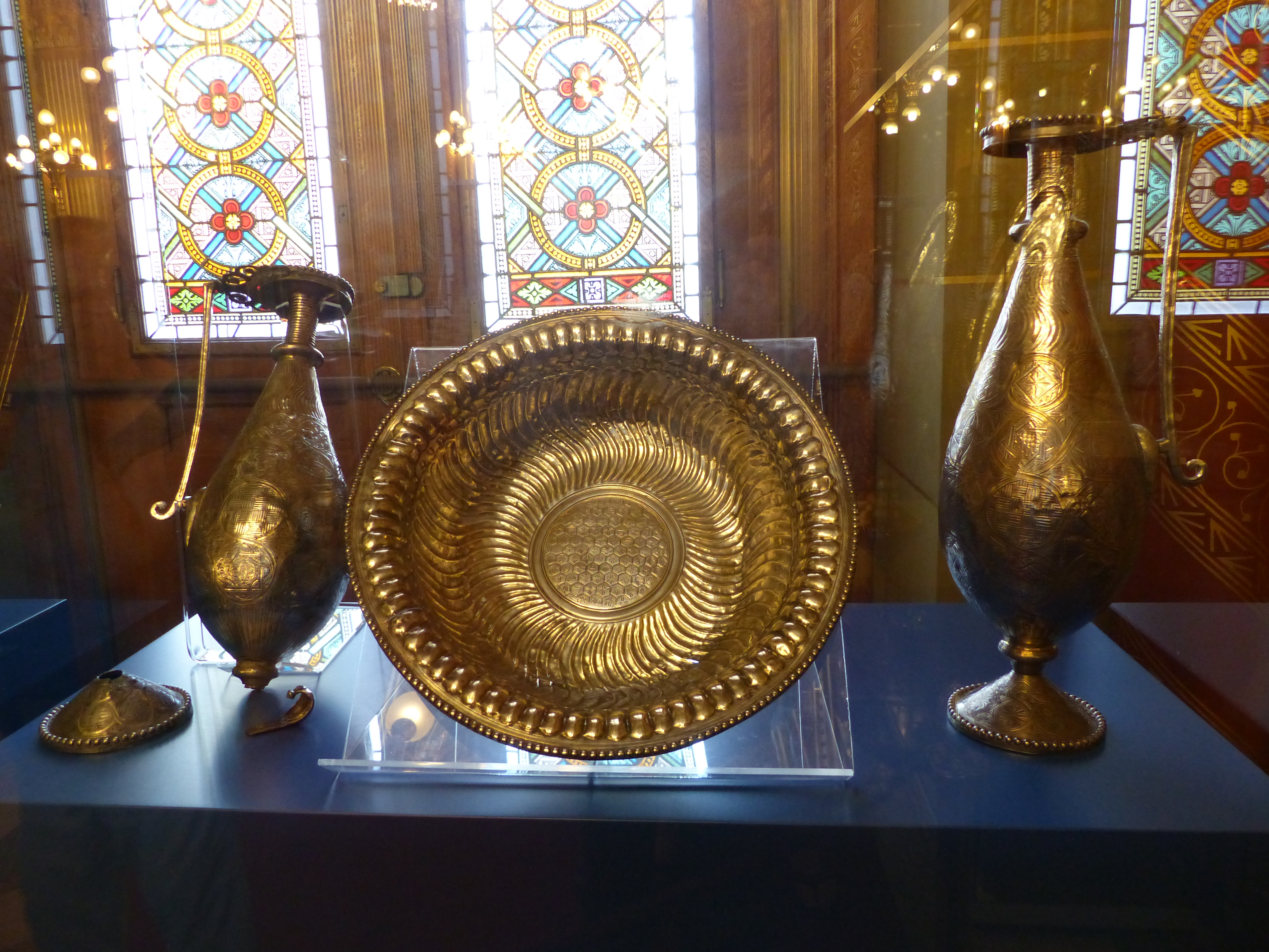 Mosdótál és kancsók. Seuso kincs. Tisztálkodáshoz használhatták a 6 liter űrtartalmú mosdótálat. Átmérője 46 cm, tömege 2 kg. A díszítés hasonlósága és a méretbeli egyezések alapján a kancsók a mosdótállal egy készletet alkothattak.